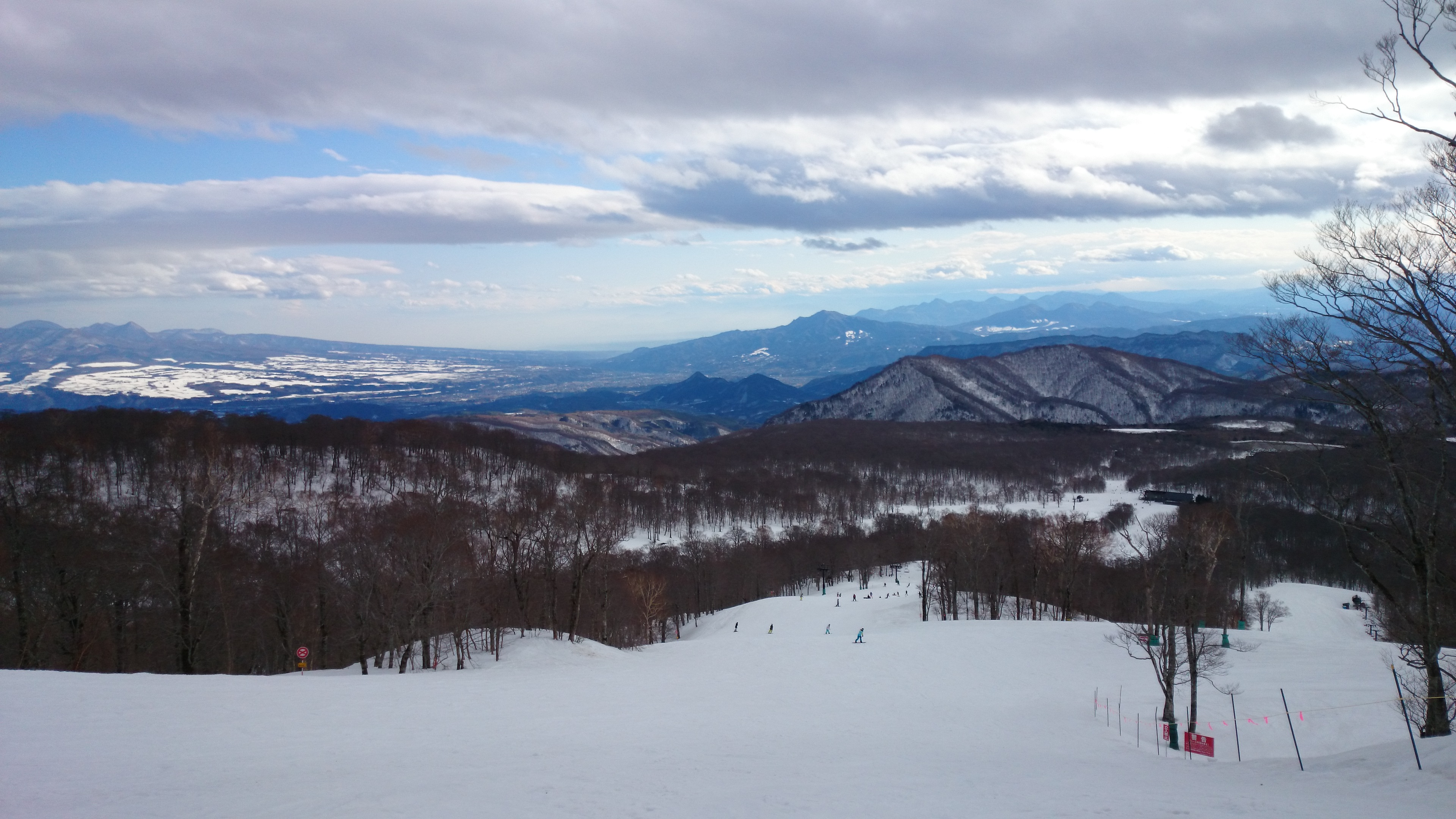 たんばらスキーパーク山頂付近からの眺め